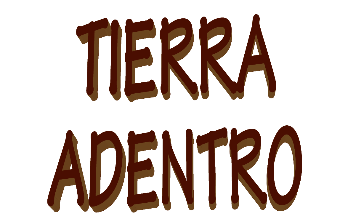 Tierra Adentro